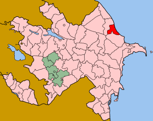 Map of Azerbaijan showing Siazan (Siyəzən) rayon.